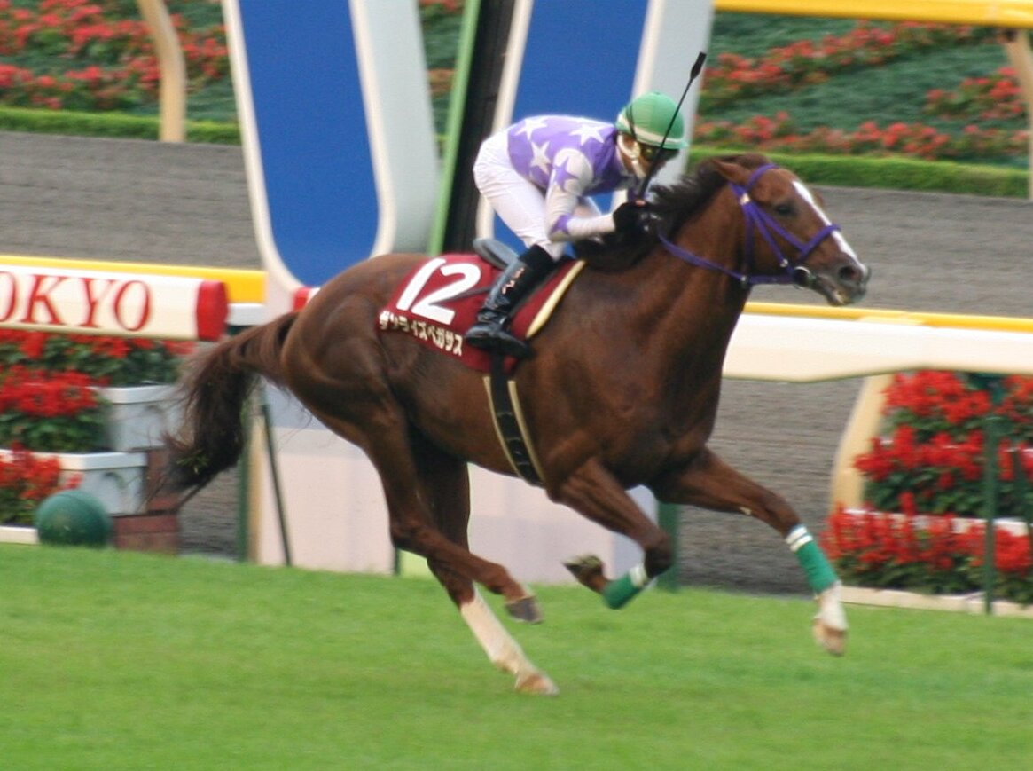 サンライズペガサス（毎日王冠）